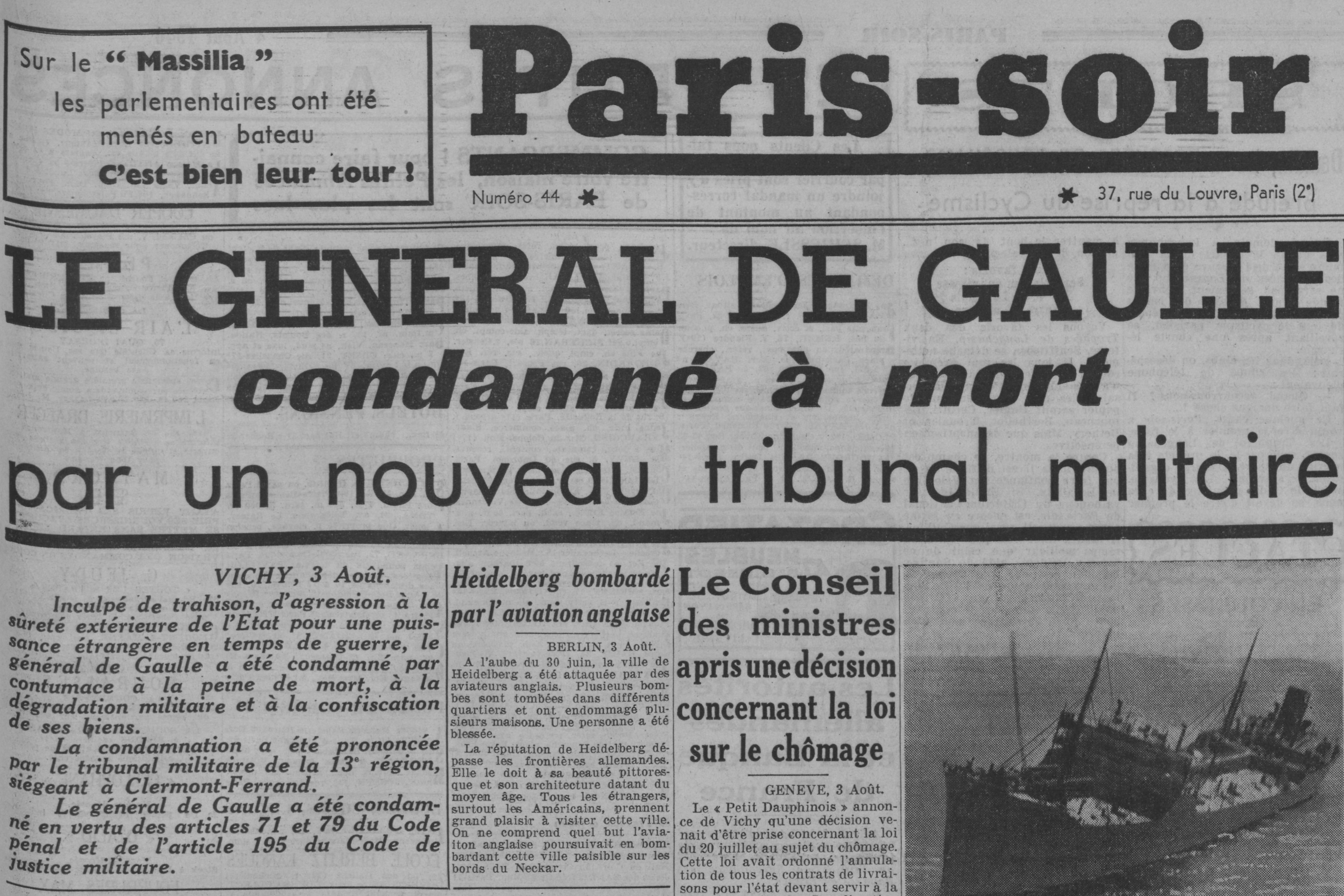 Paris-soir : "Le général de Gaulle condamné à mort par un nouveau tribunal militaire".